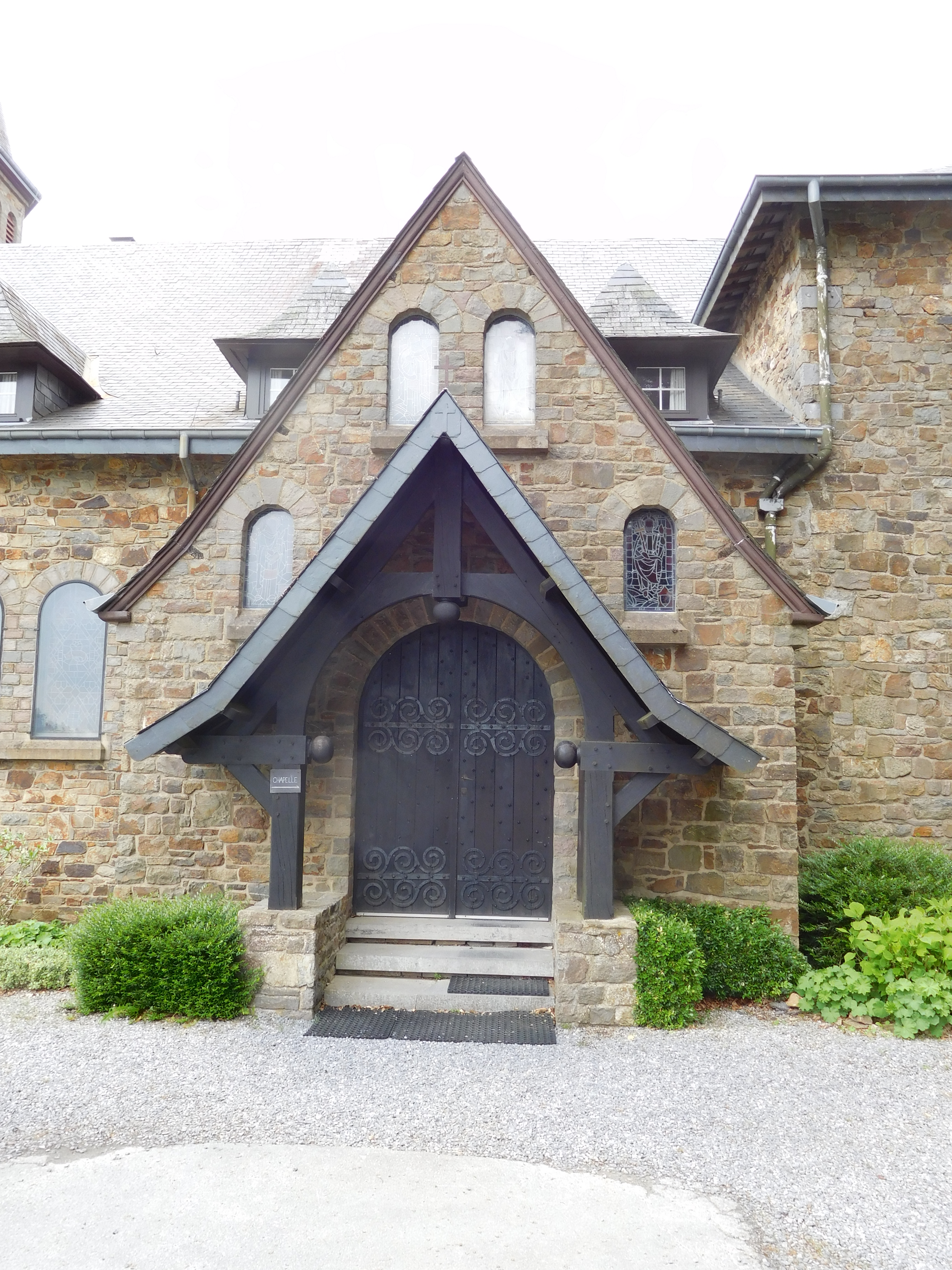 Entrée du monastère bénédictin d'Hurtebise, à Saint-Hubert (Belgique)